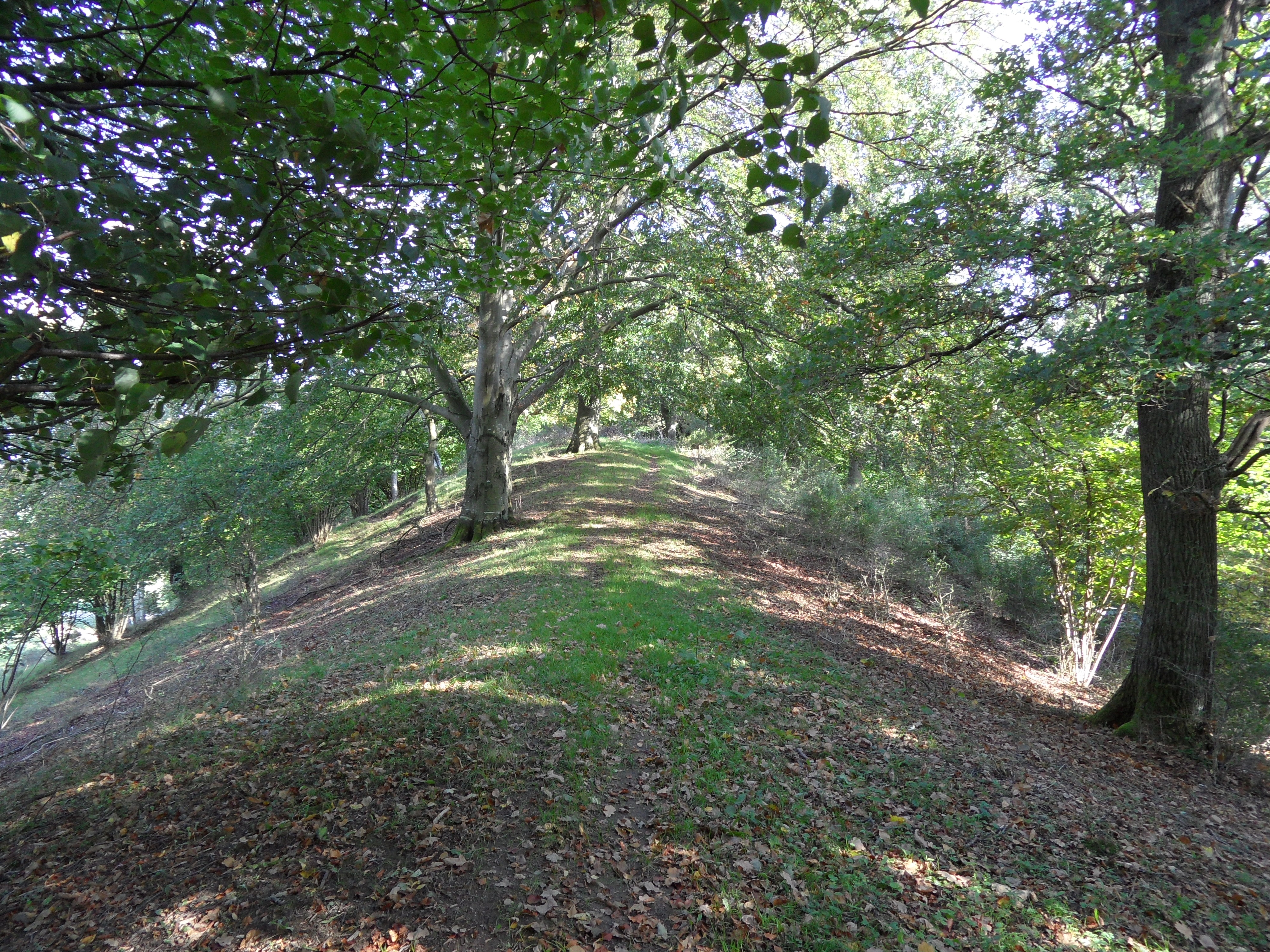 Naturreservatet Bosarps Jär Rullstensås "Getryggsås"